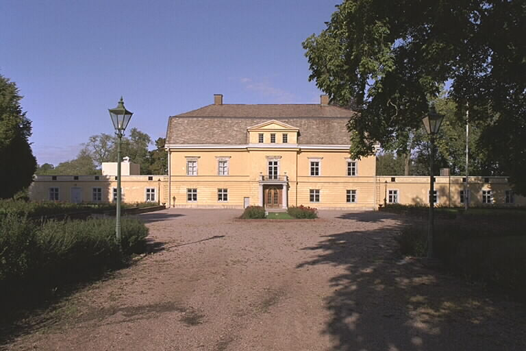 Motiv: Hönsäters herrgård Nyckelord: Byggnadsminnen Kategori: HerrgårdHönsäters herrgård